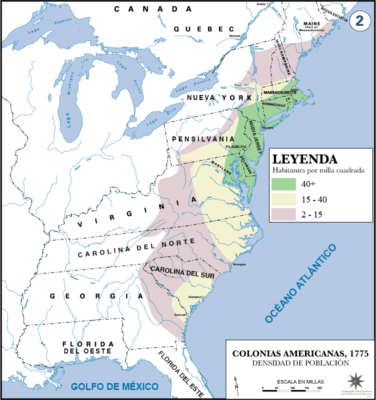 Mapa que muestra la densidad poblacional de las 13 Colonias Americanas en el año 1775